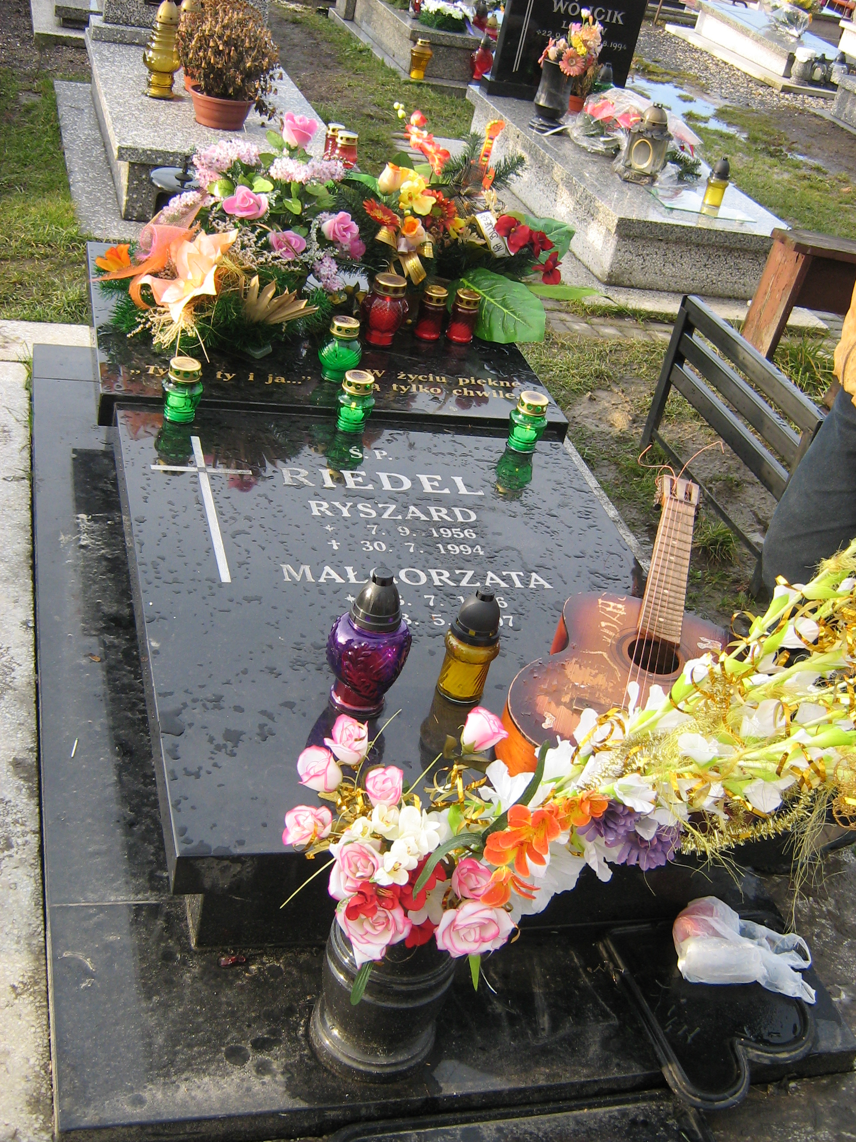 Wspólny grób Ryśka Riedla i Goli